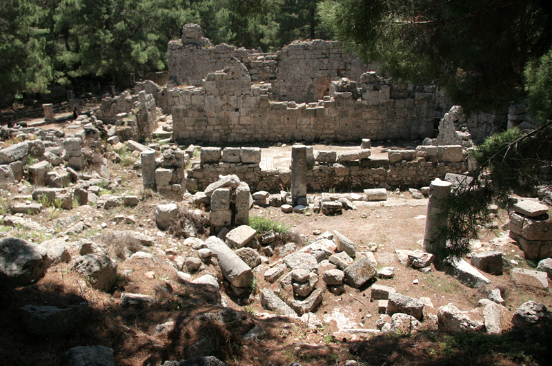 Phaselis